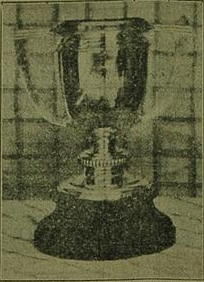 Copa de Honor de Segunda División "General Juan Domingo Perón"